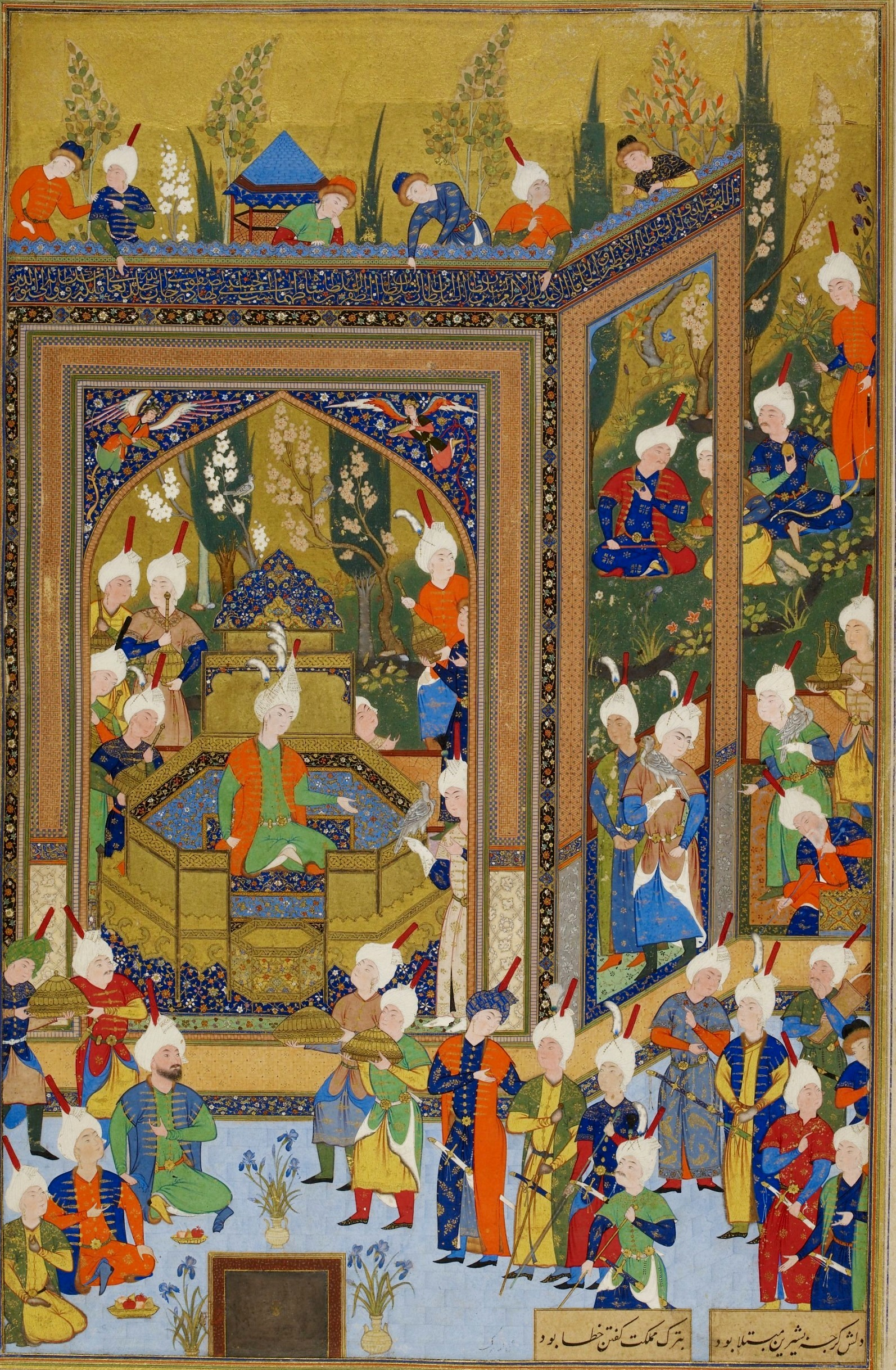 Miniature: Xosrovun taxta çıxması